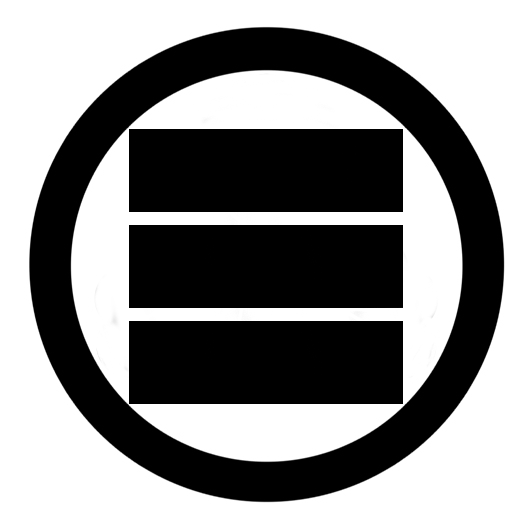 丸に三つ算木